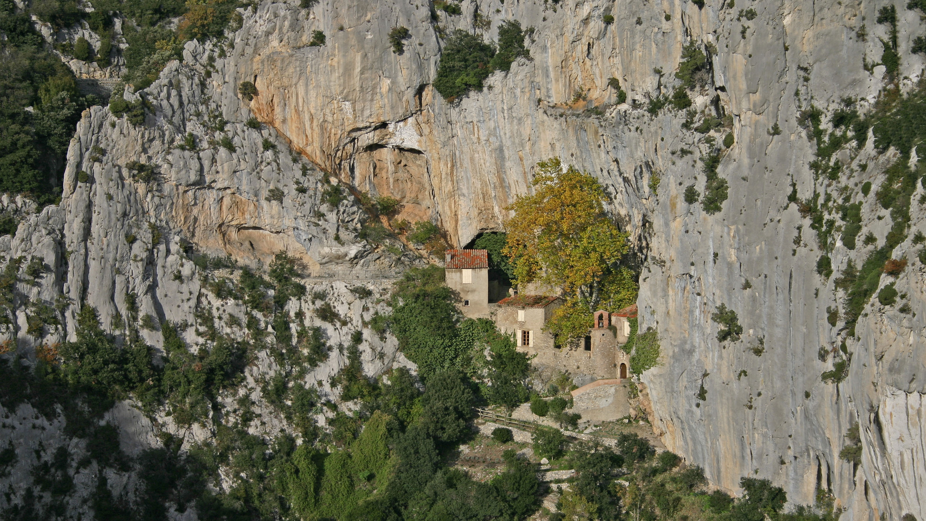 Ermitage